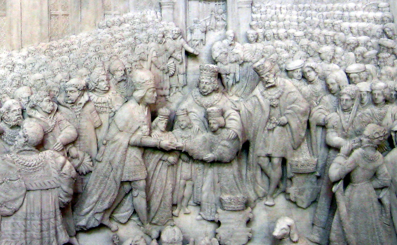 Doppelhochzeit von Kaiser Maximilians Enkeltochter und Enkelsohn mit den Kindern des jagiellonischen Königshauses